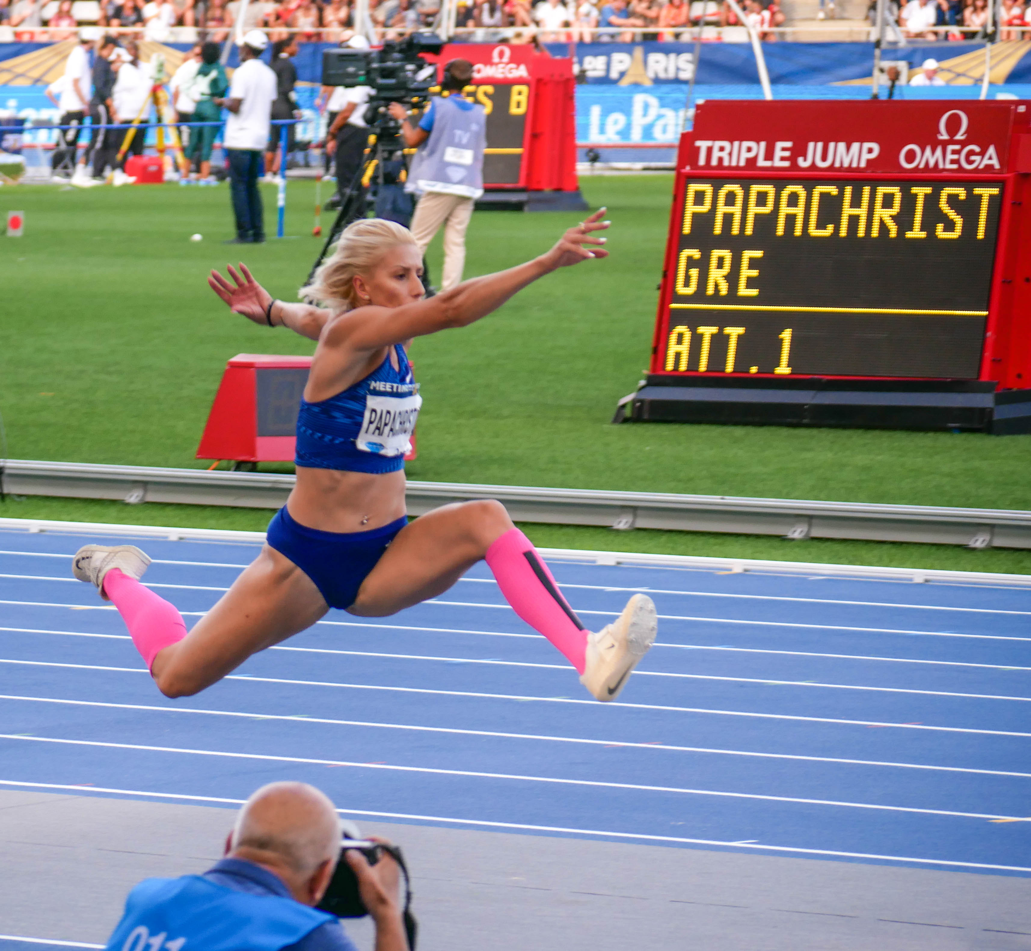 Meeting de Paris 2019 - Compétition d'athlétisme au stade Charlety - 24 août 2019